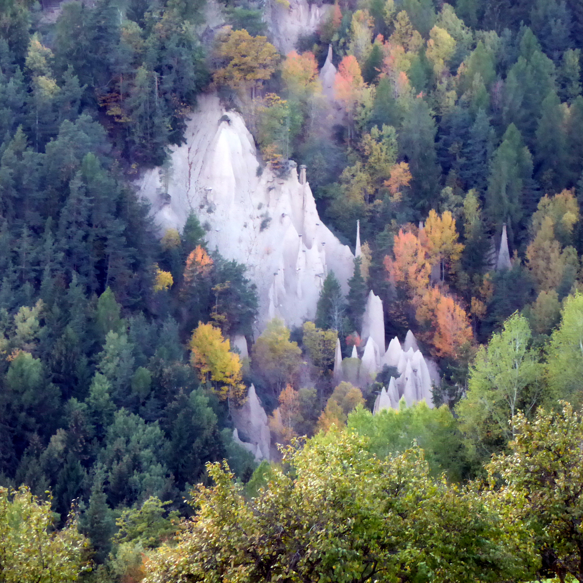 Rittner Erdpyramiden im Herbst